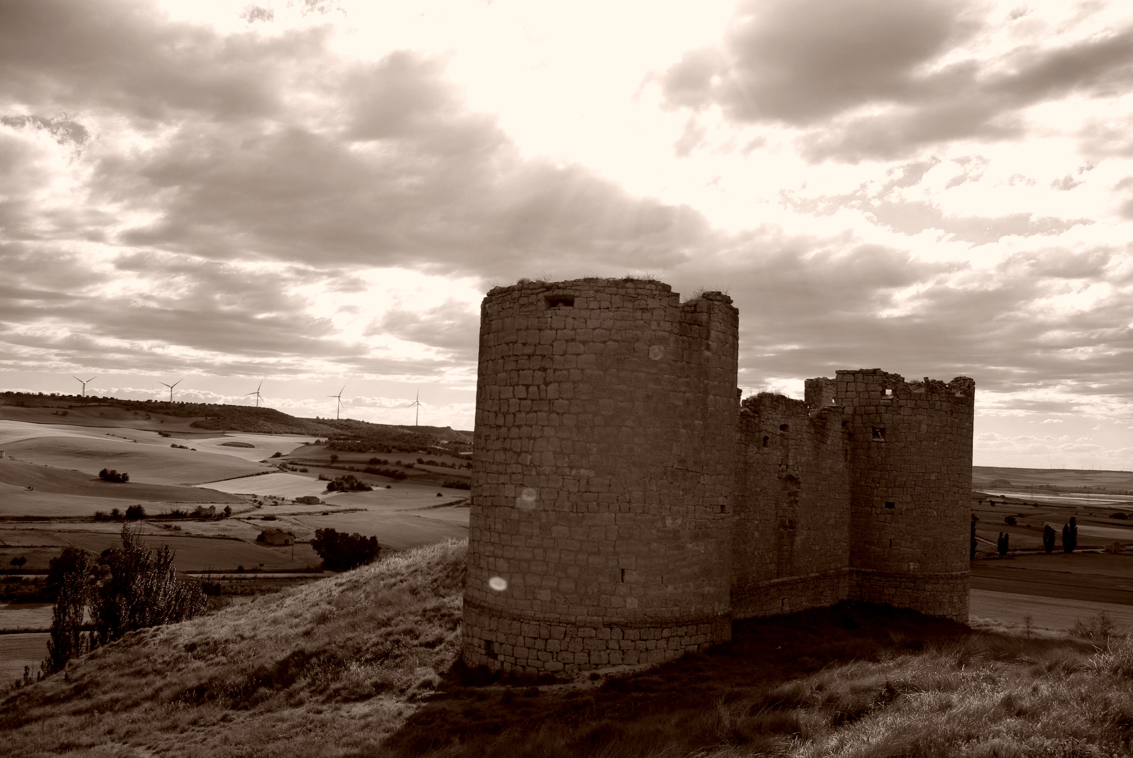 Fue refugio de Juana la Loca en el camino a Tordesillas con su difunto marido. 150.244.129.